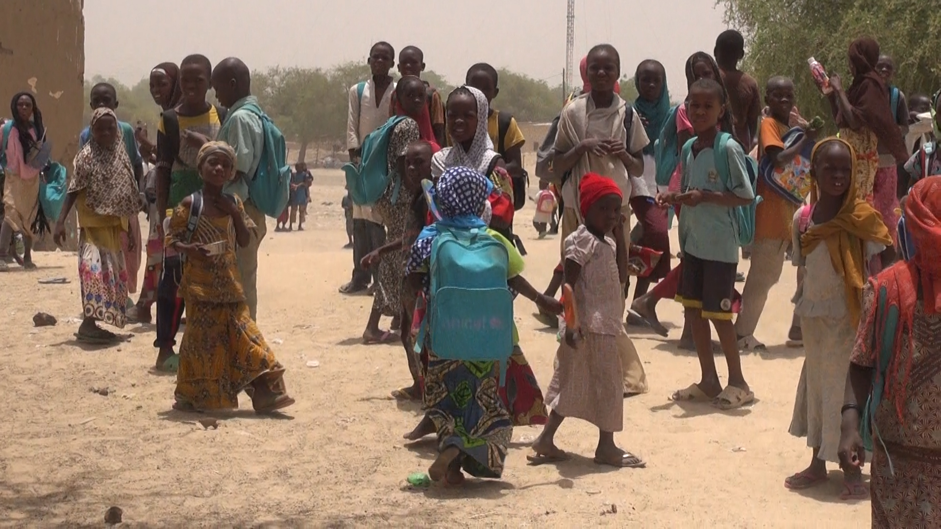 Des enfants à la sortie de l'école à Bosso dans la région de Diffa, Niger, le 19 avril 2017 (VOA/Nicolas Pinault)